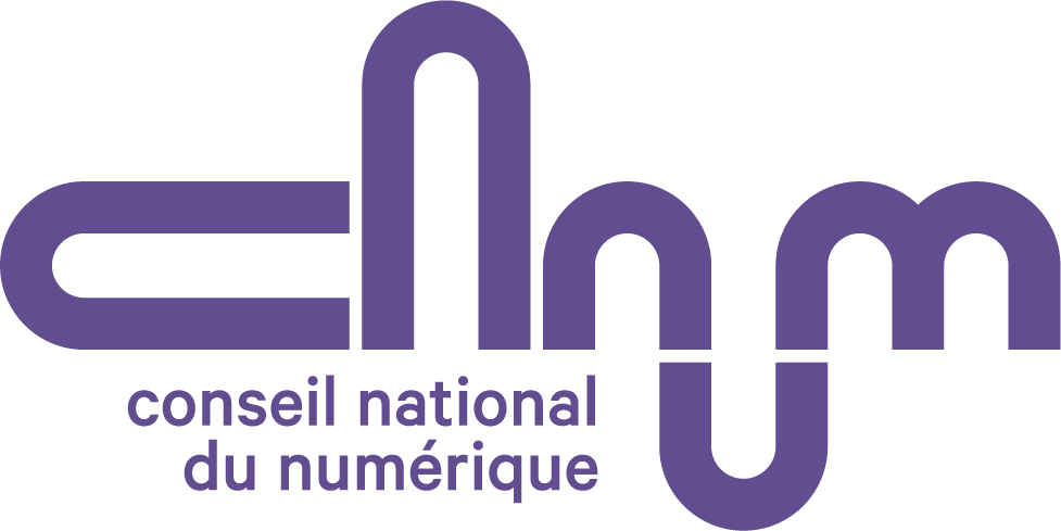 Le logo du Conseil national du numérique depuis le 11 décembre 2017.